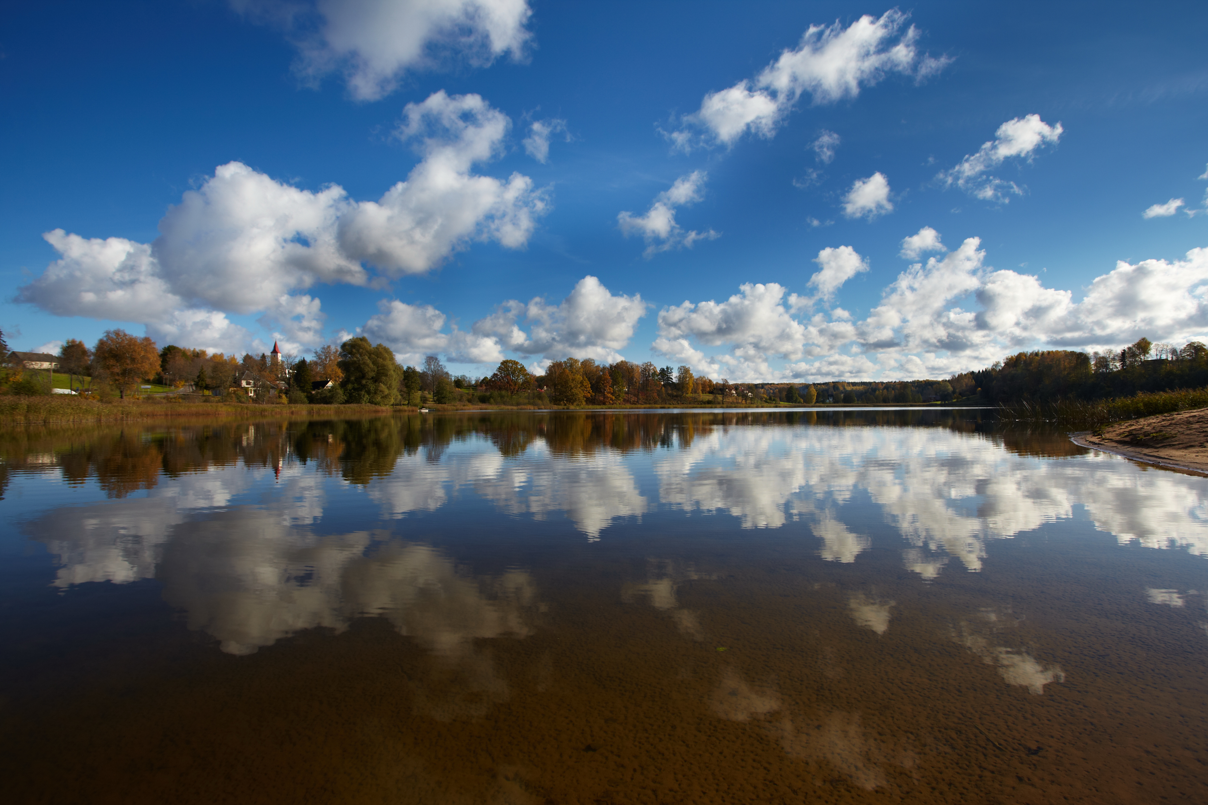 Rõuge Suurjärv 2011. aasta oktoobris.